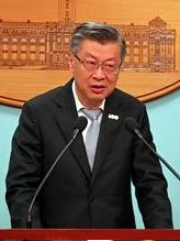 中華民國總統府記者會，行政院副院長陳冲回答記者提問。